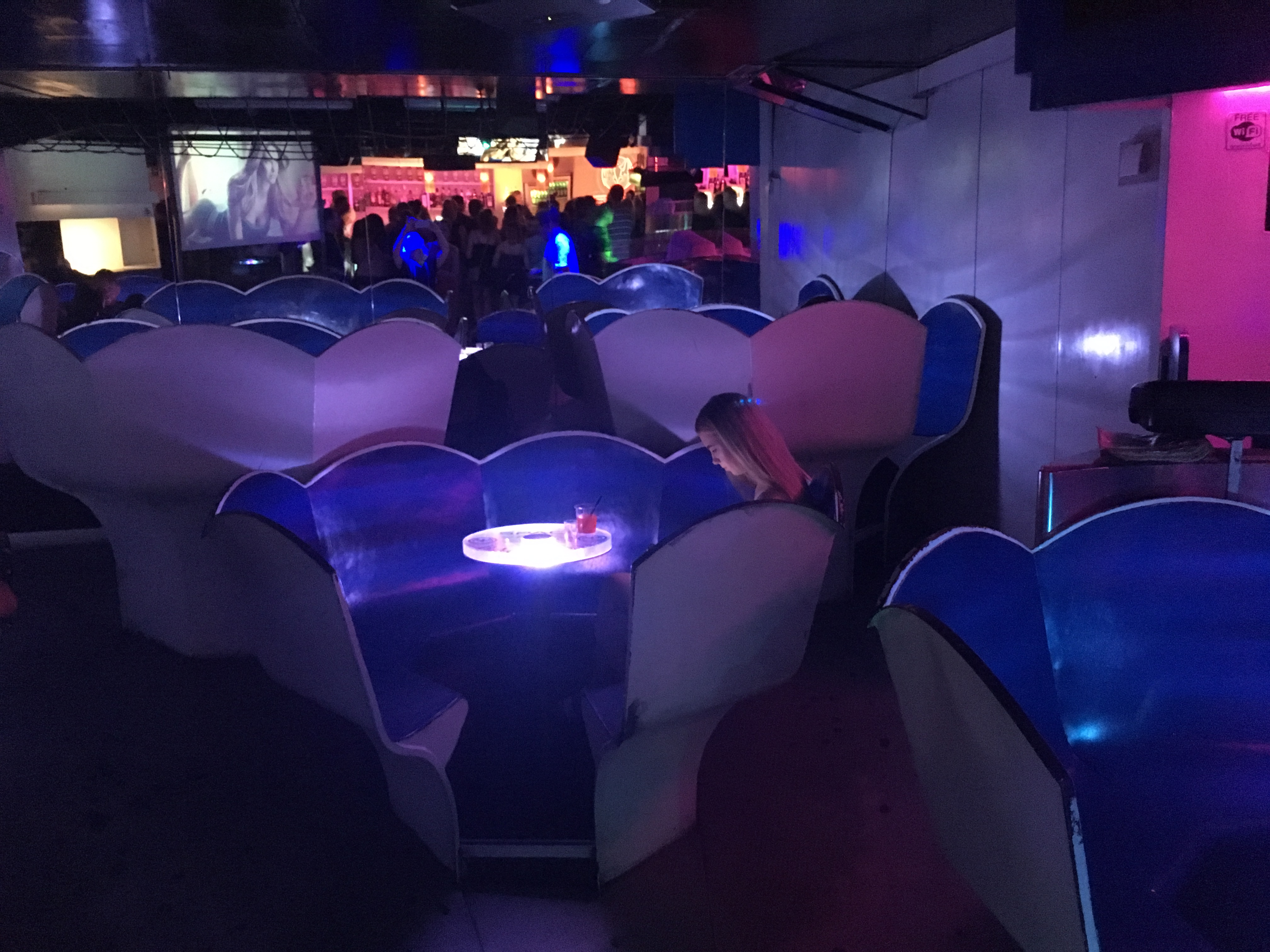 Space Electronic, discoteca di Firenze